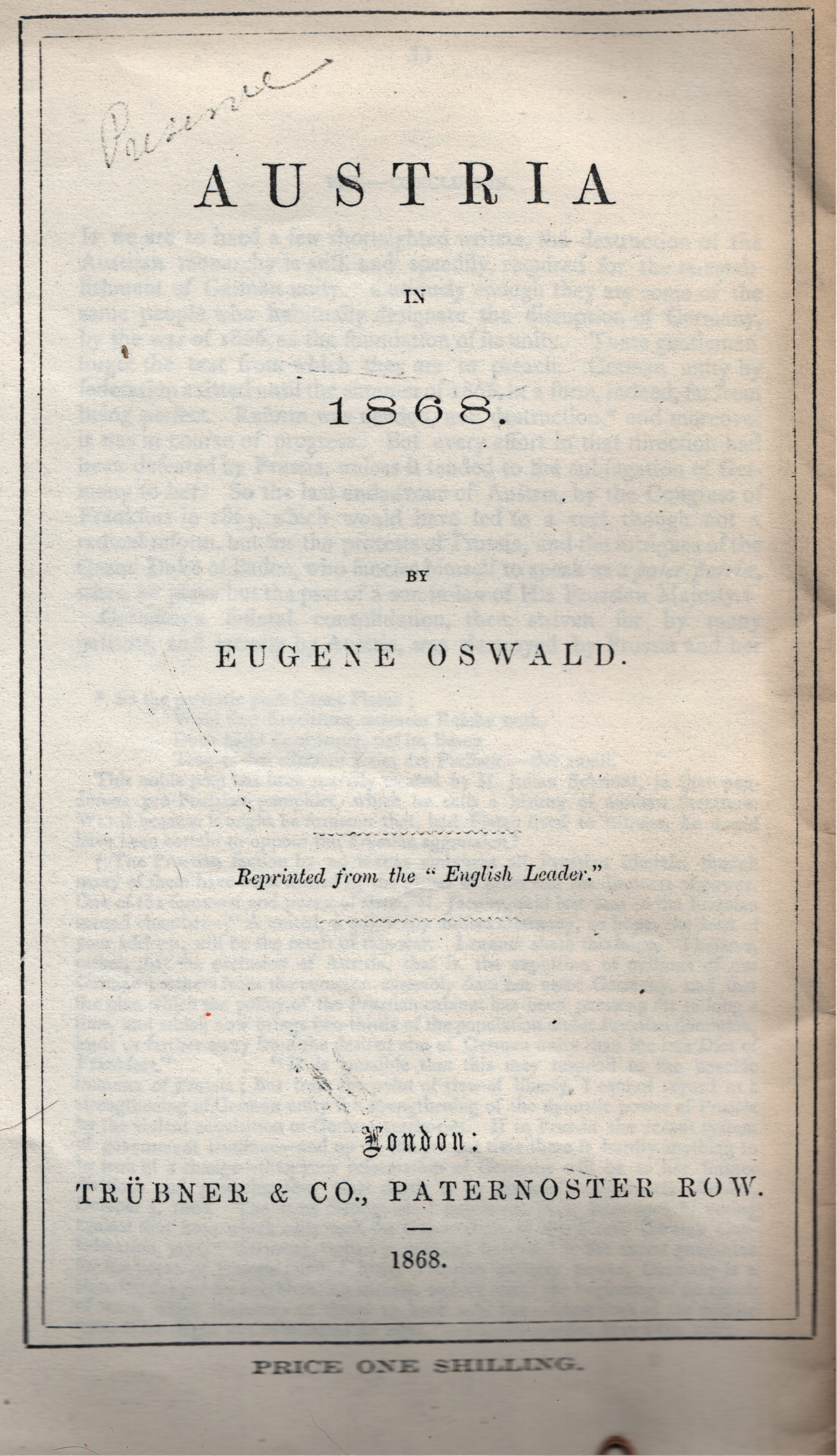 Eugen Oswald: Austria in 1868. Trübner 1869